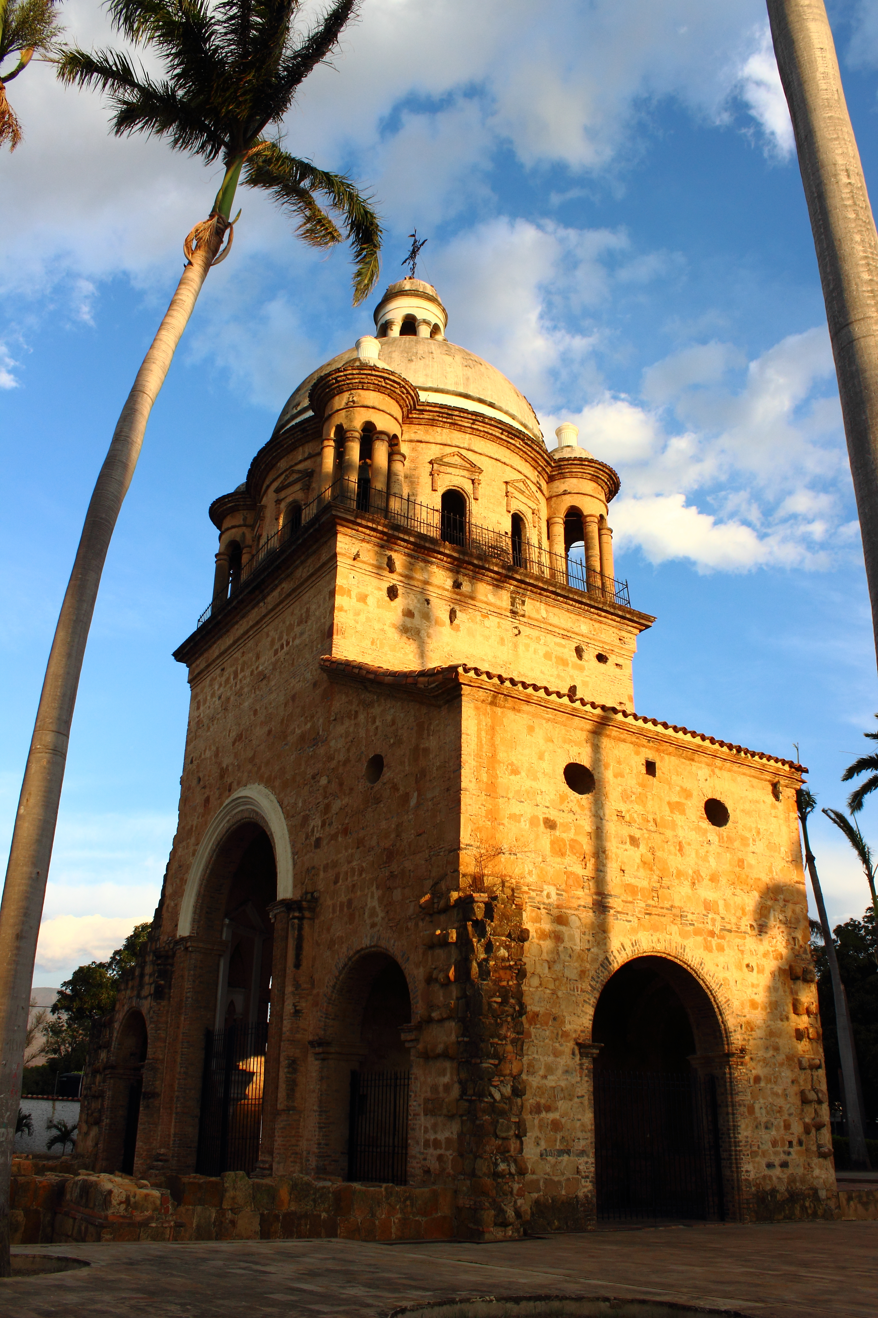 Templo Histórico de Cúcuta, Ubicado en el parque Gran Colombiano donde también esta ubicada la casa Museo Casa Natal del General Santander